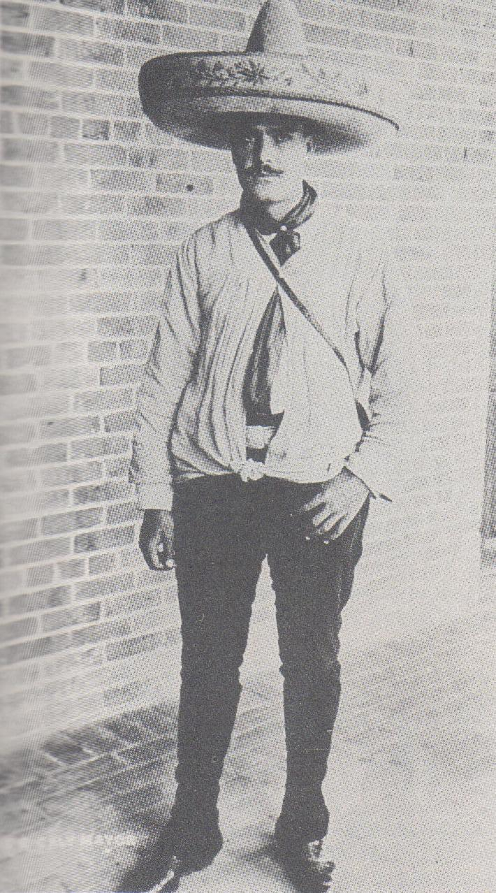 General Rafel Cal y Mayor Murguía, Zapatista